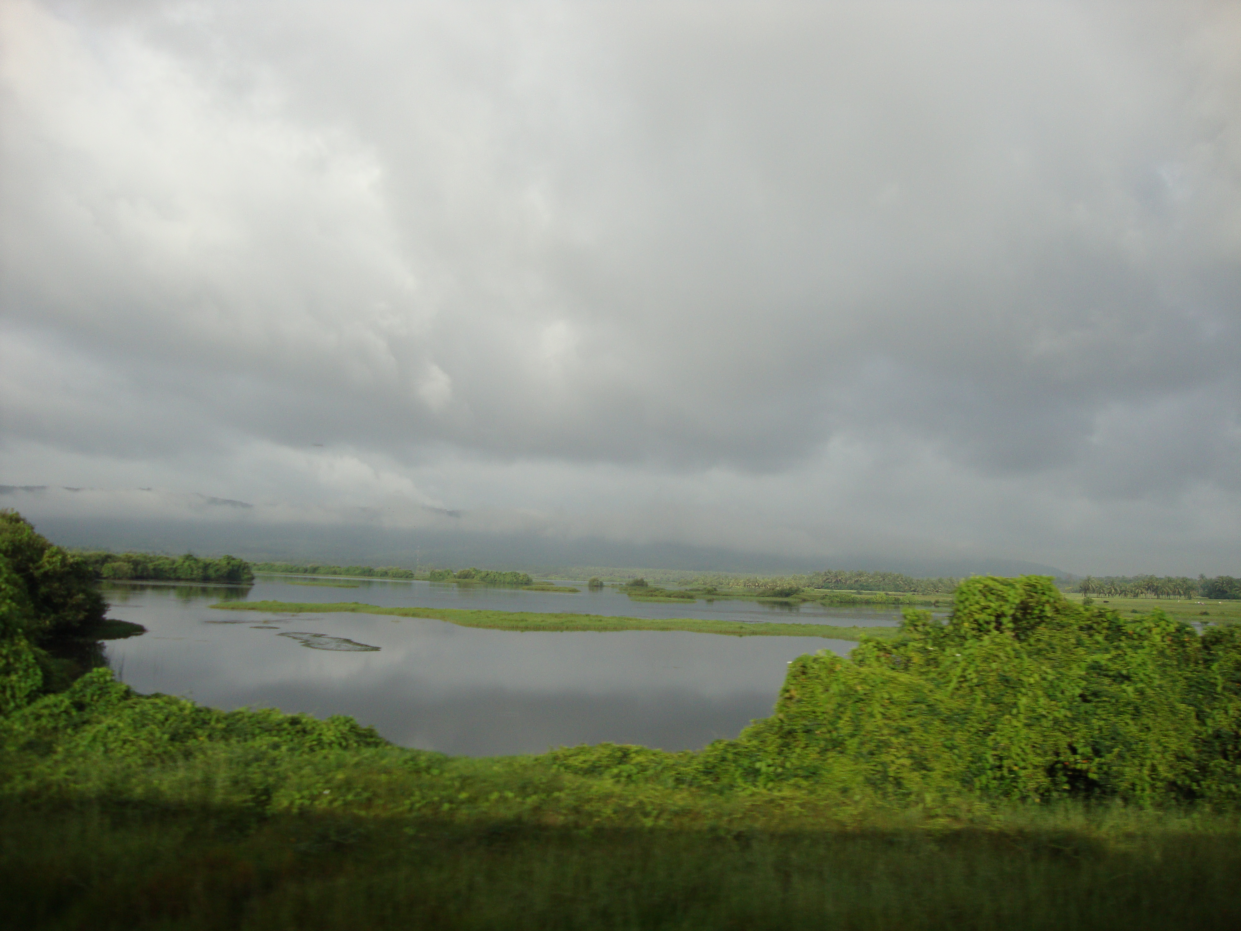 കവ്വായി കായൽ